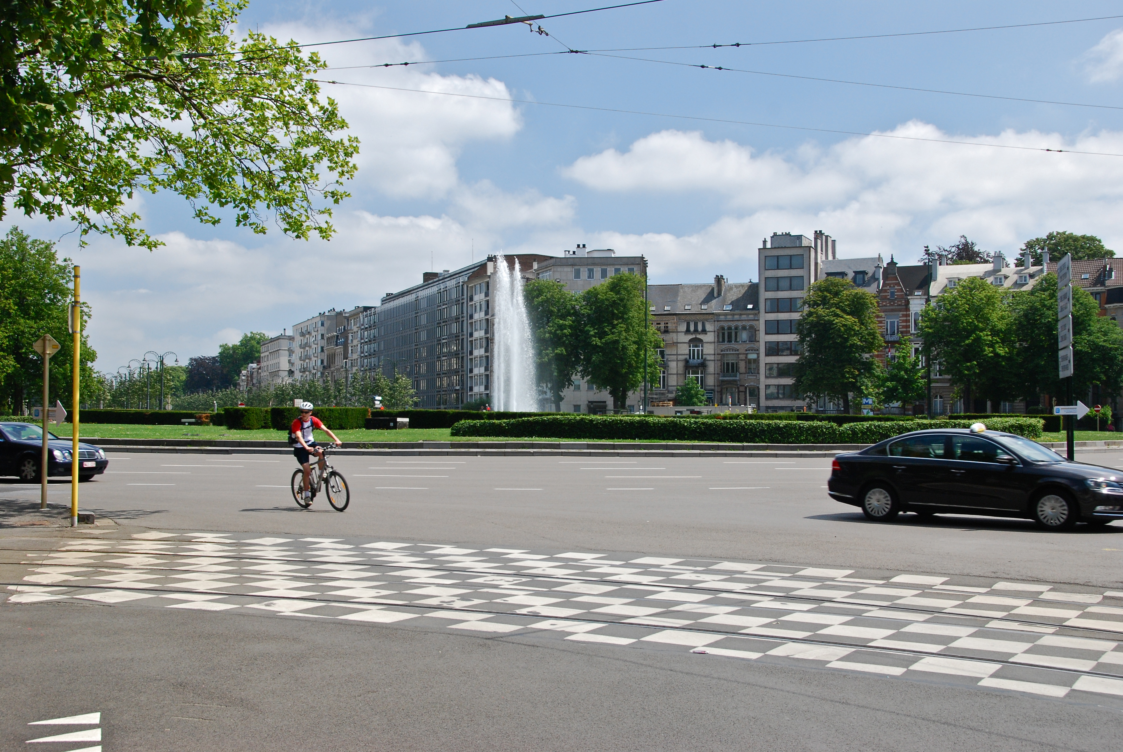 square Maréchal Montgomery / Maarschalk Montgomeryplein